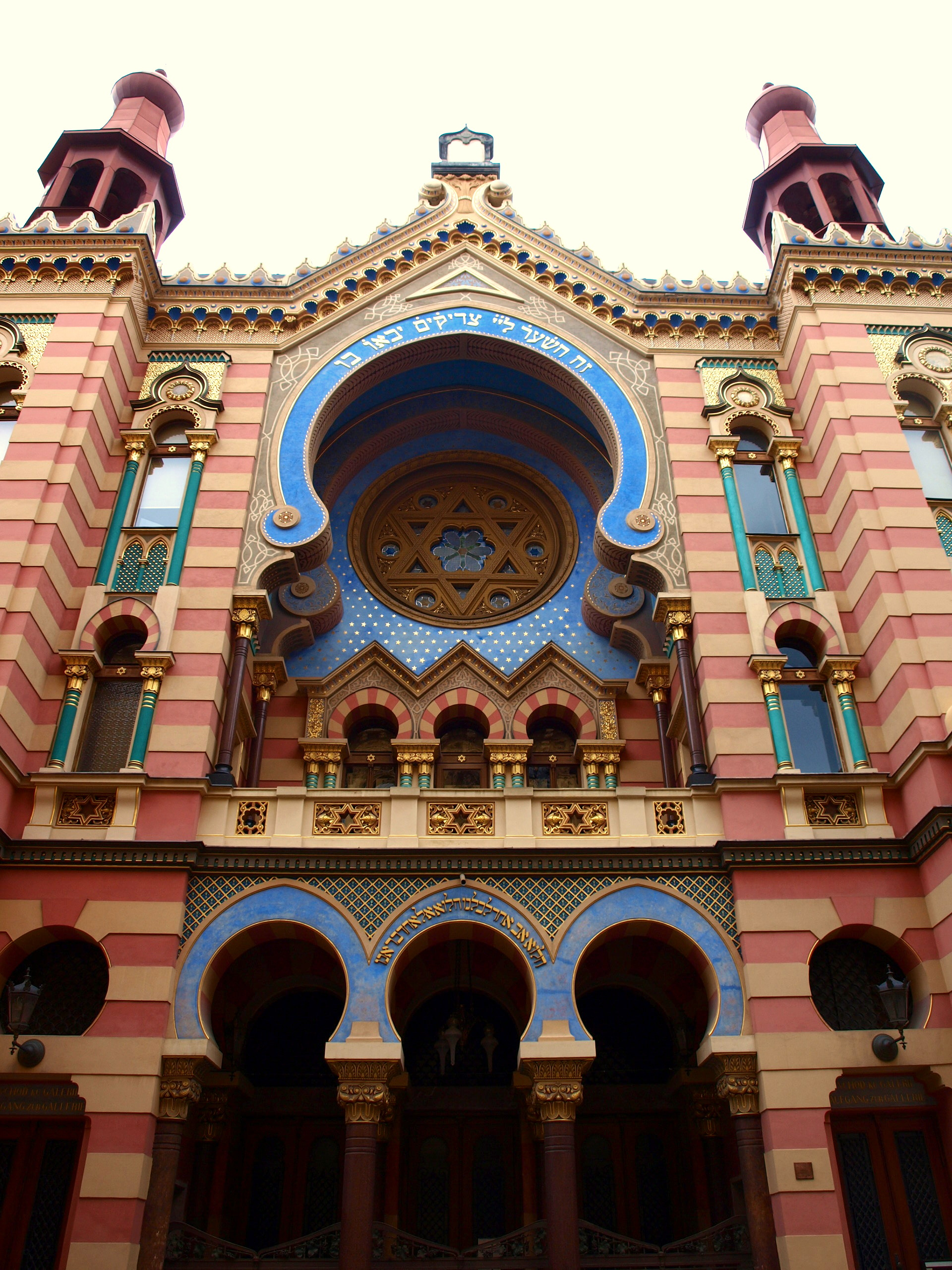 Jeruzalémská synagoga